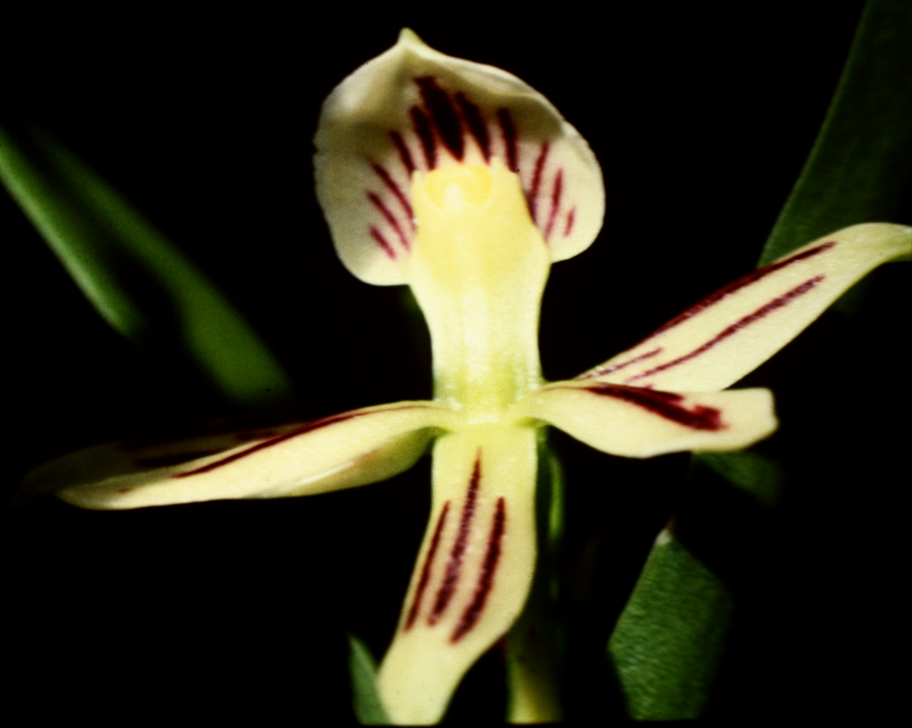 Encyclia calamaria , Suriname.